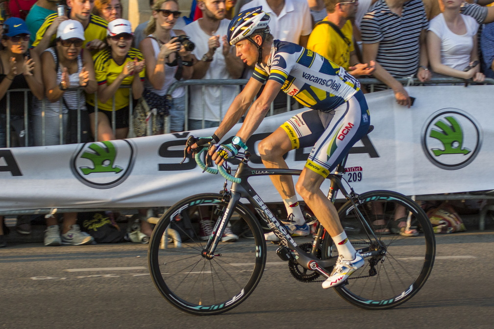 Lieuwe Westra durant la dernière étape du Tour de France 2013